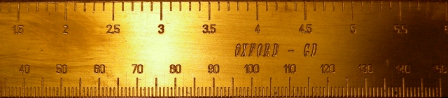 Metallmaßstab aus Messing (Zoll/Millimeter)